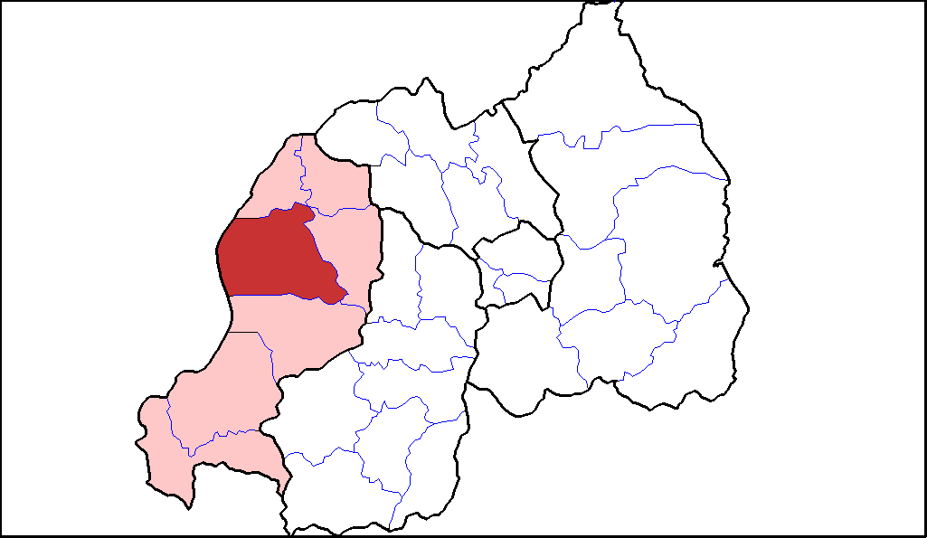 Distretto di Rutsiro.